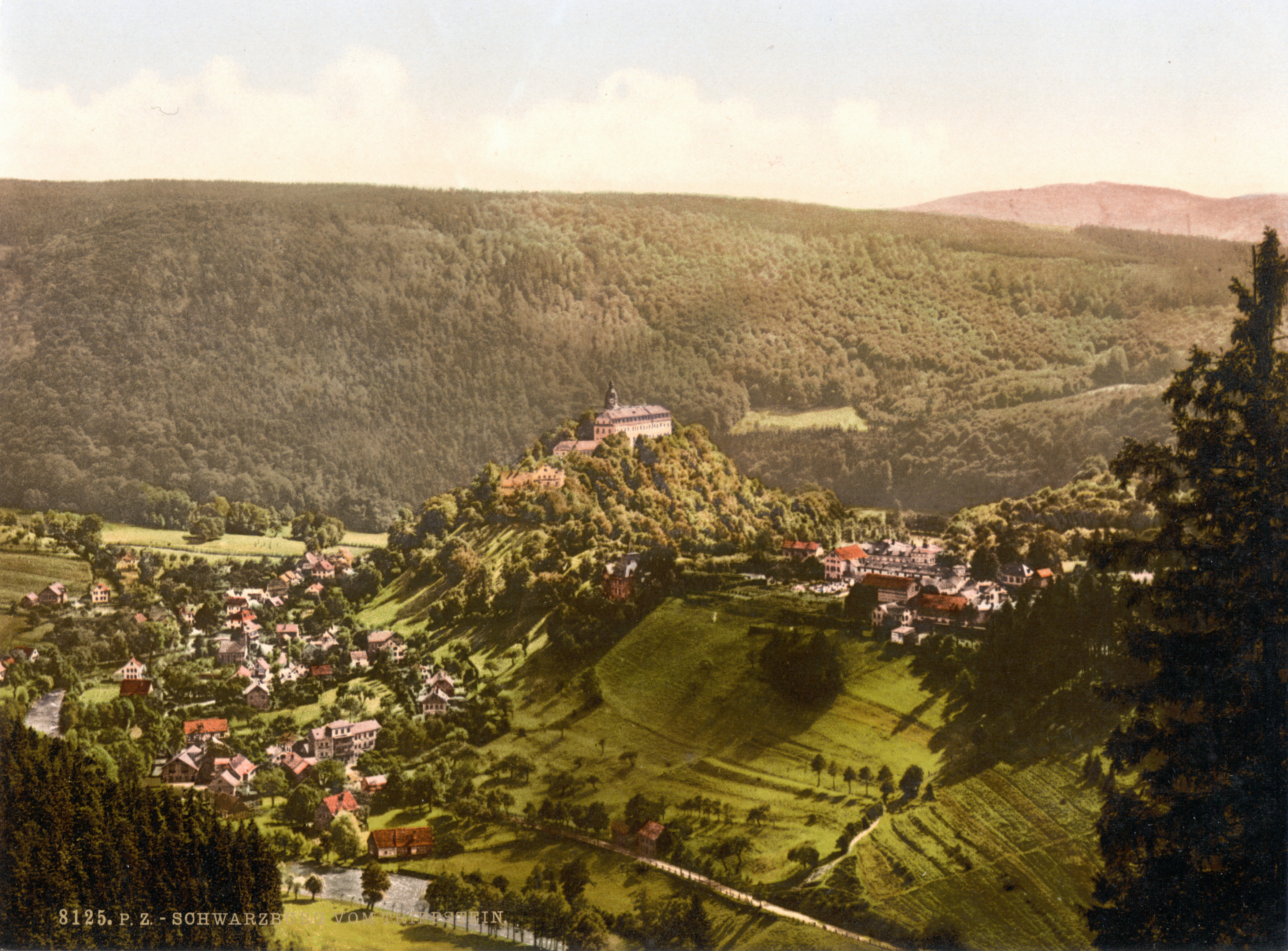 Blick vom Trippstein auf Schwarzburg um 1900